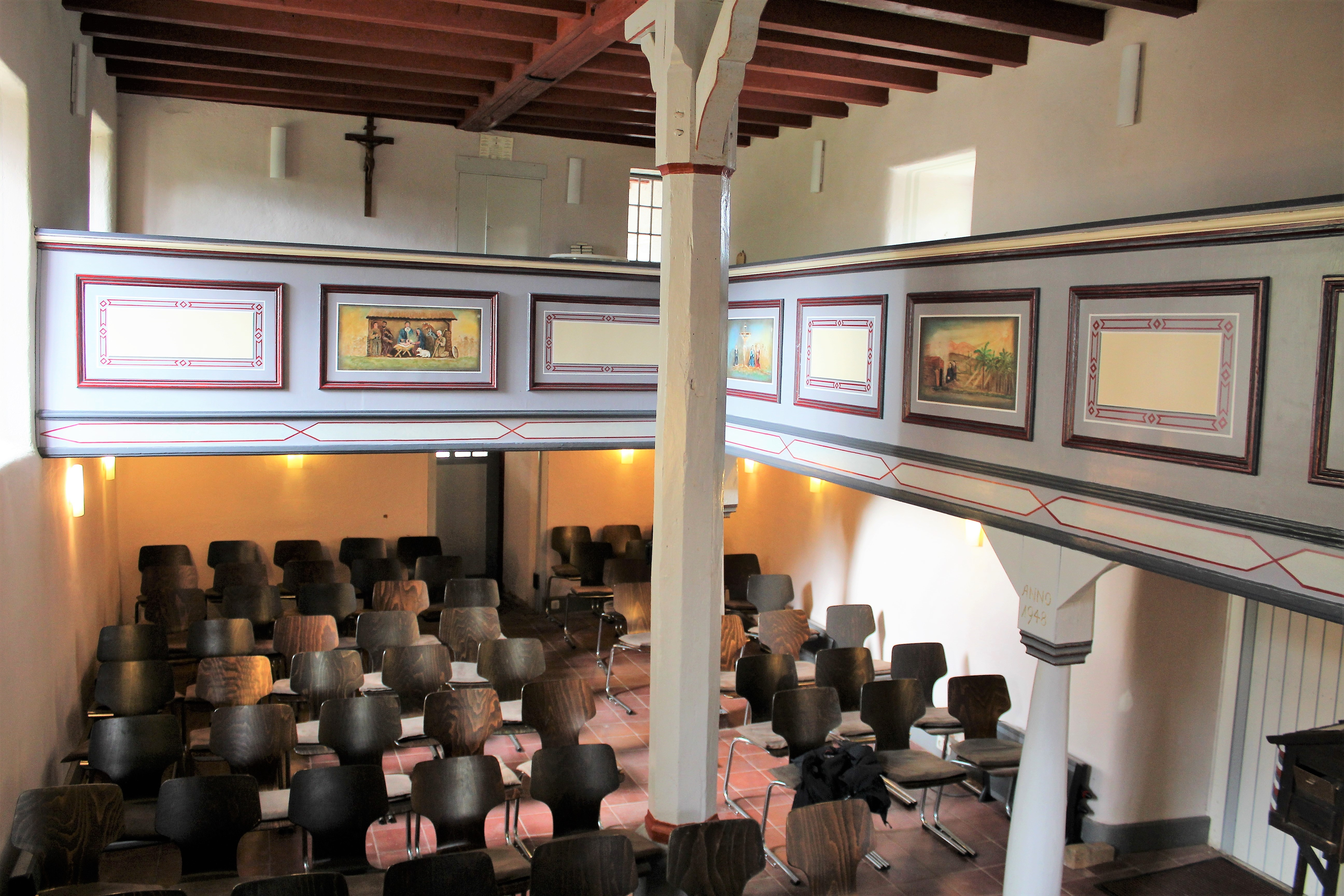 Alte Kirche Weidenhausen, Gemeinde Hüttenberg, Lahn-Dill-Kreis, Hessen, Deutschland